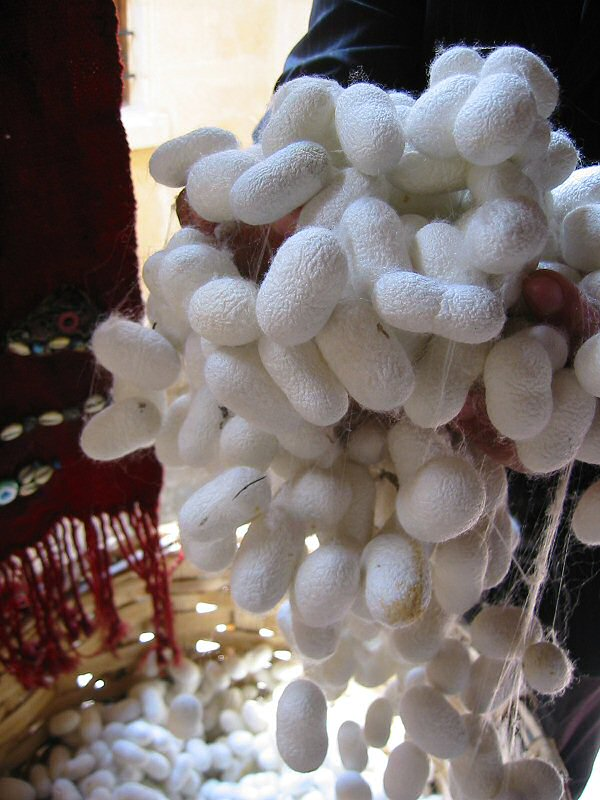 silk cocoon